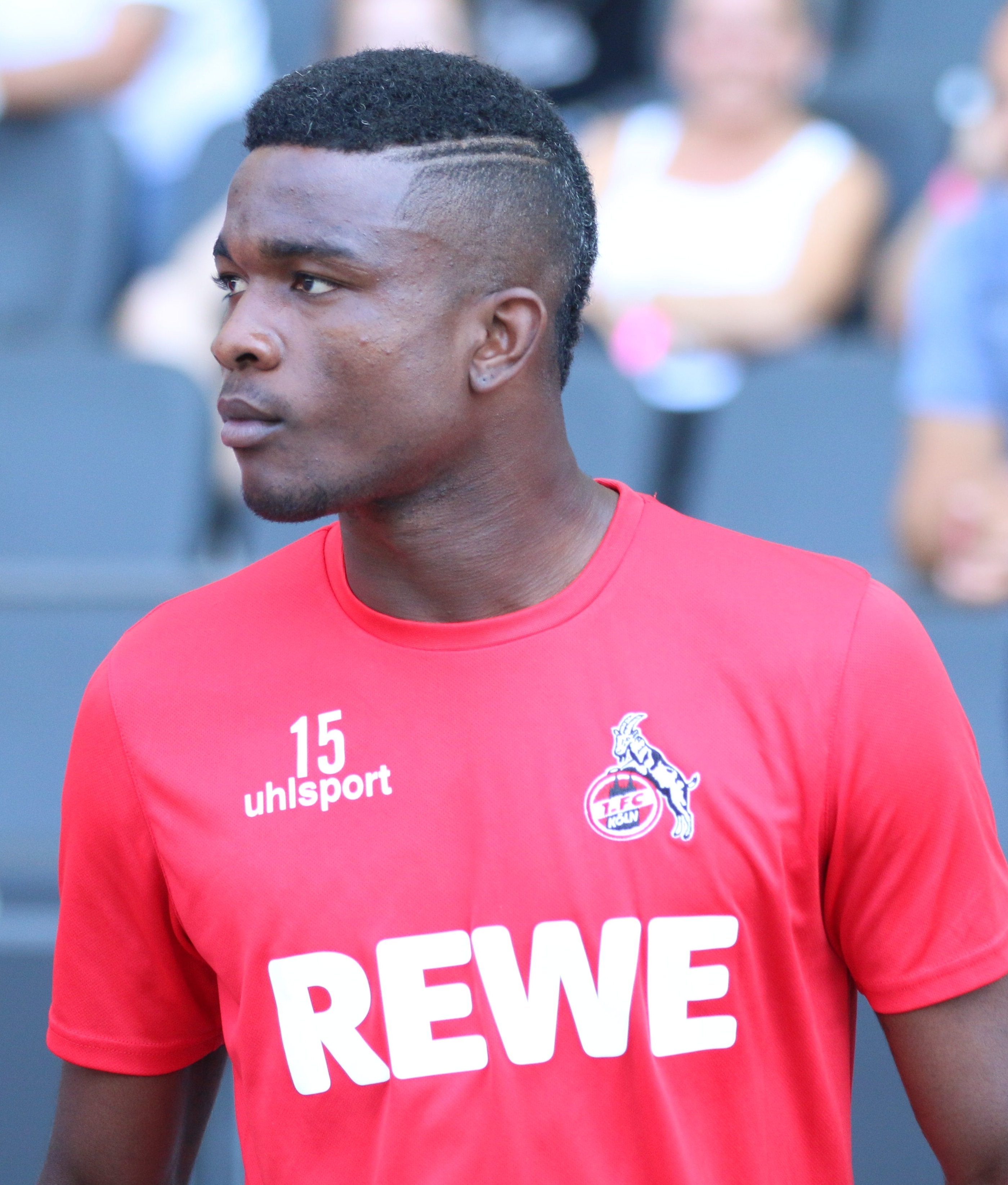 DFB-Pokal 2018/19, 1. Hauptrunde: BFC Dynamo gegen 1. FC Köln 1:9 (1:4)